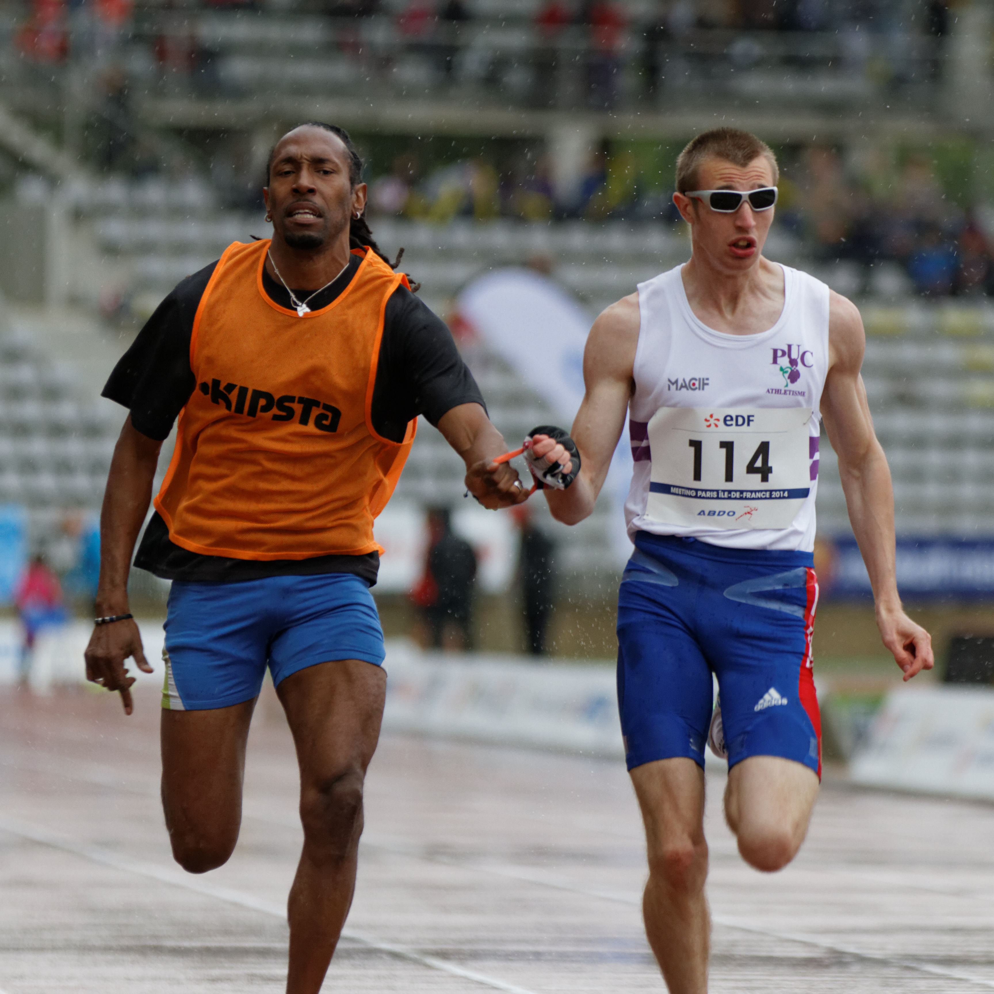 Timothée Adolphe et Cédric Felip (guide), 100m, Meeting d'Athlétisme Paralympique de Paris, 4 juin 2014.